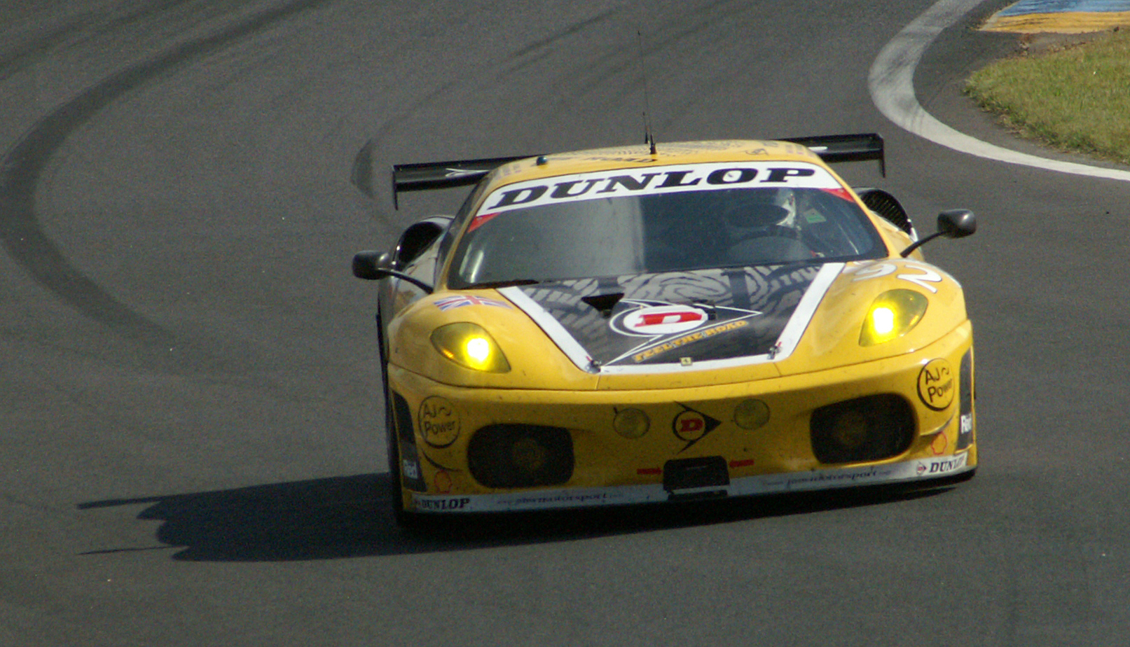 La Ferrari F430 GTC du JMW Motorsport aux mains d'Andrew Kirkaldy lors des 24 Heures du Mans 2009.